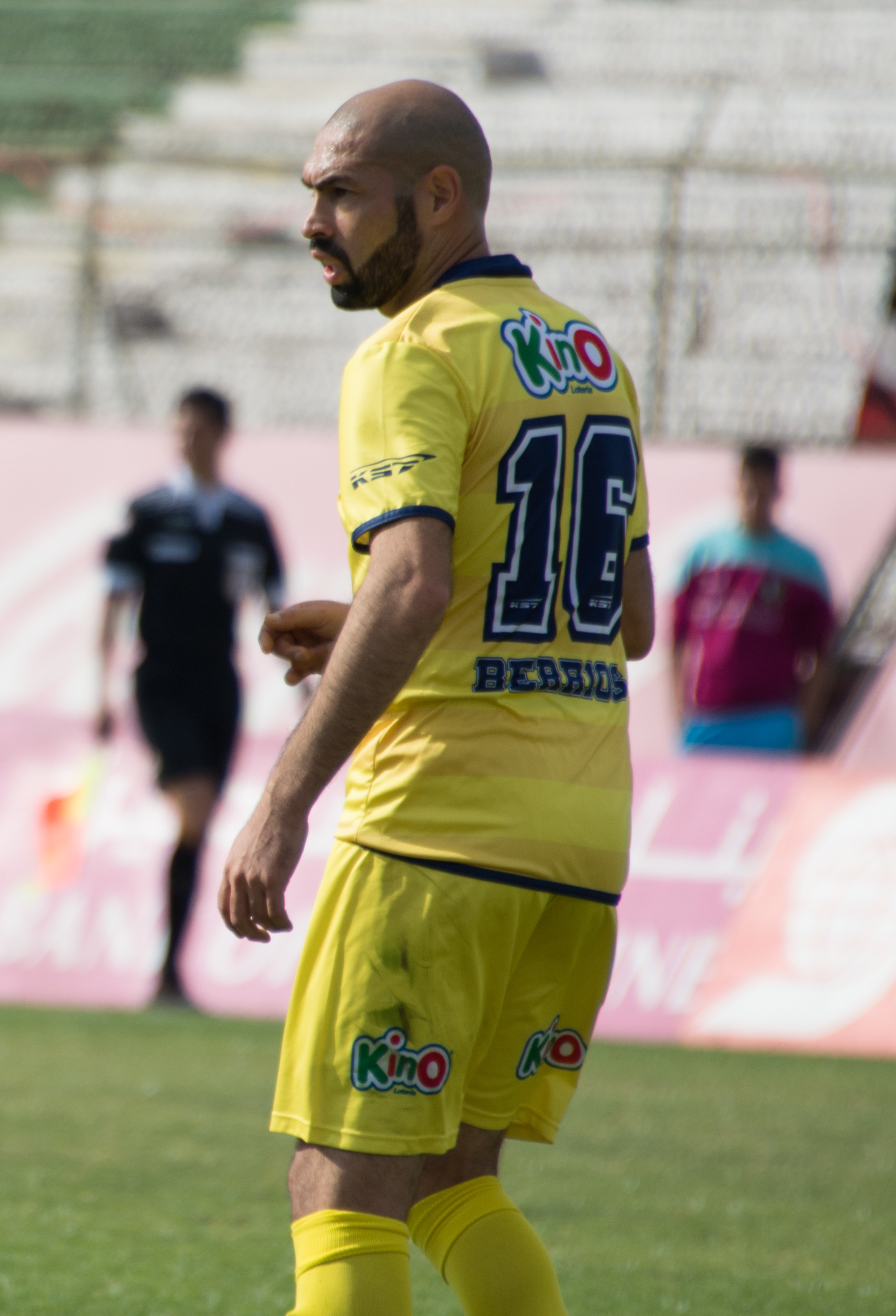 Héctor Berríos, Palestino v Universidad de Concepción, Estadio Municipal de La Cisterna, La Cisterna, Santiago, Chile.